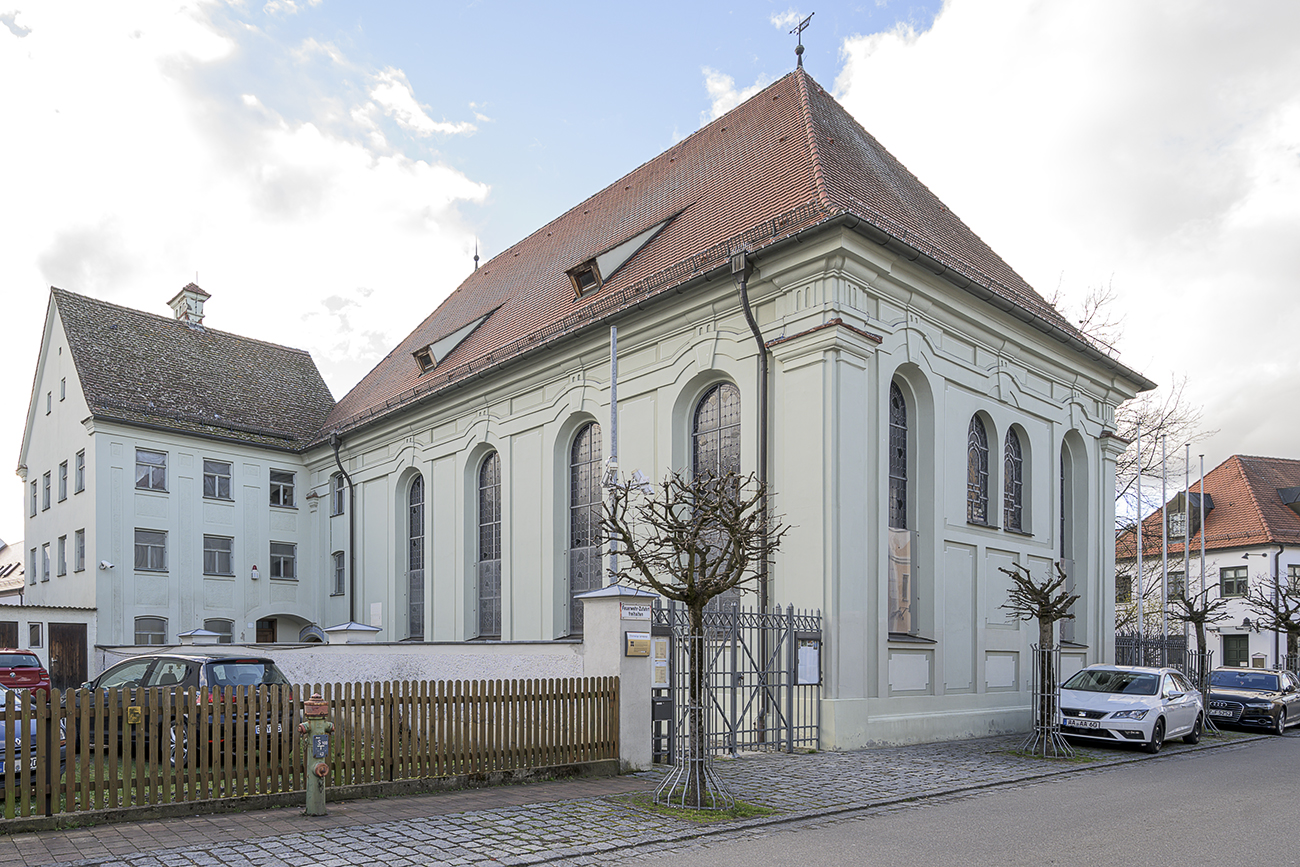 Ichenhausen, former Synagogue